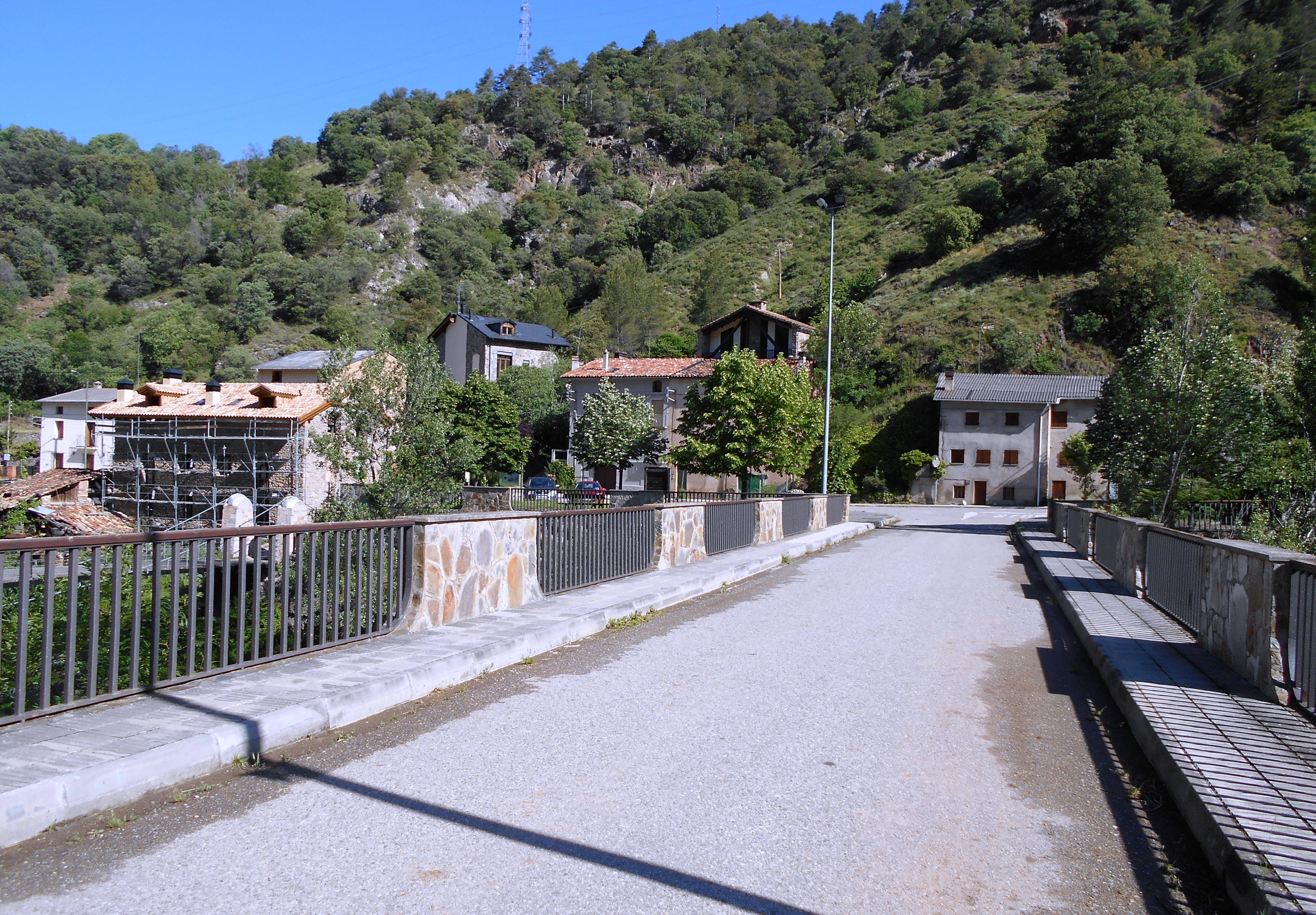 El pont nou d'Arcalís